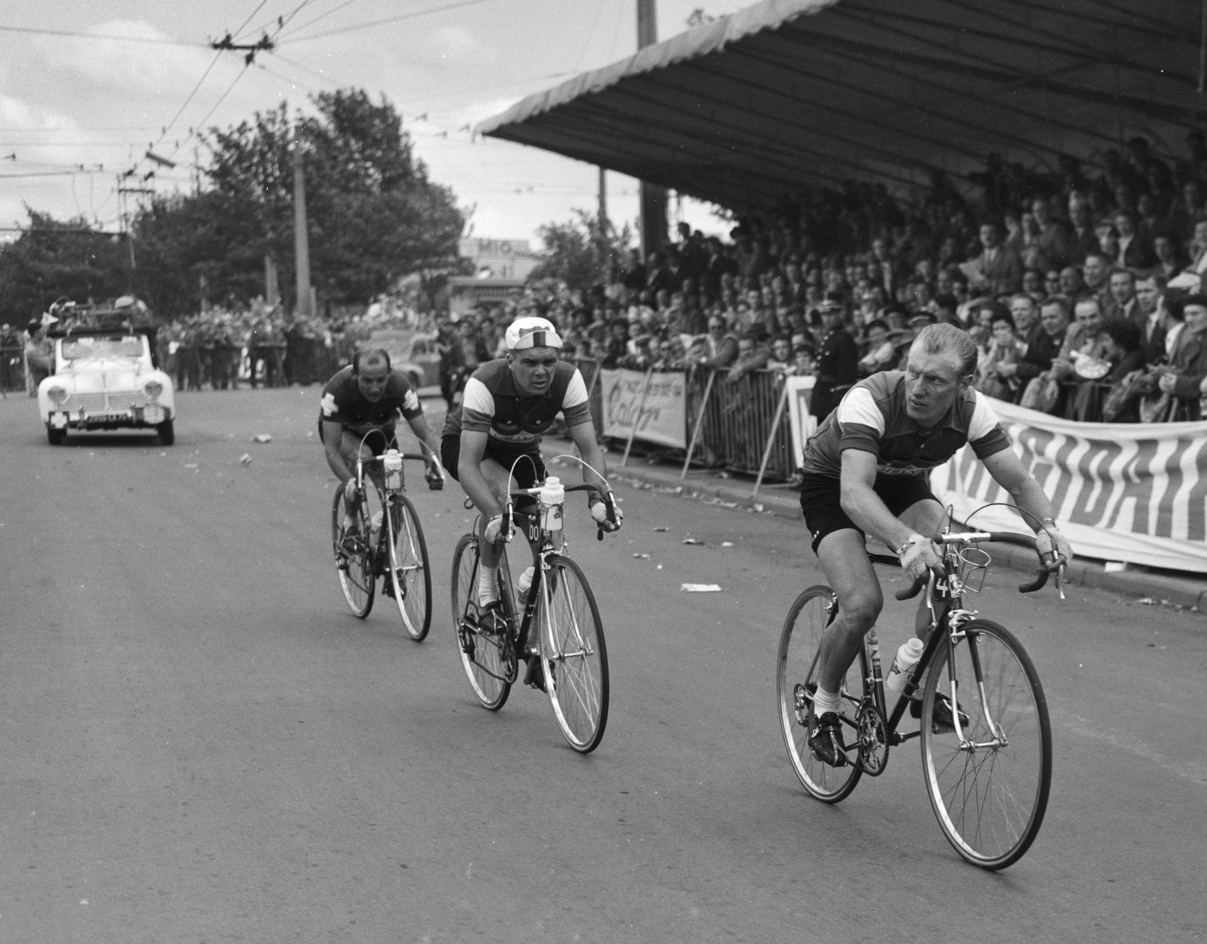 Eerste dag Tour de France Nederlands peloton Reims. Finish Darigade (Frankrijk) winnaar.